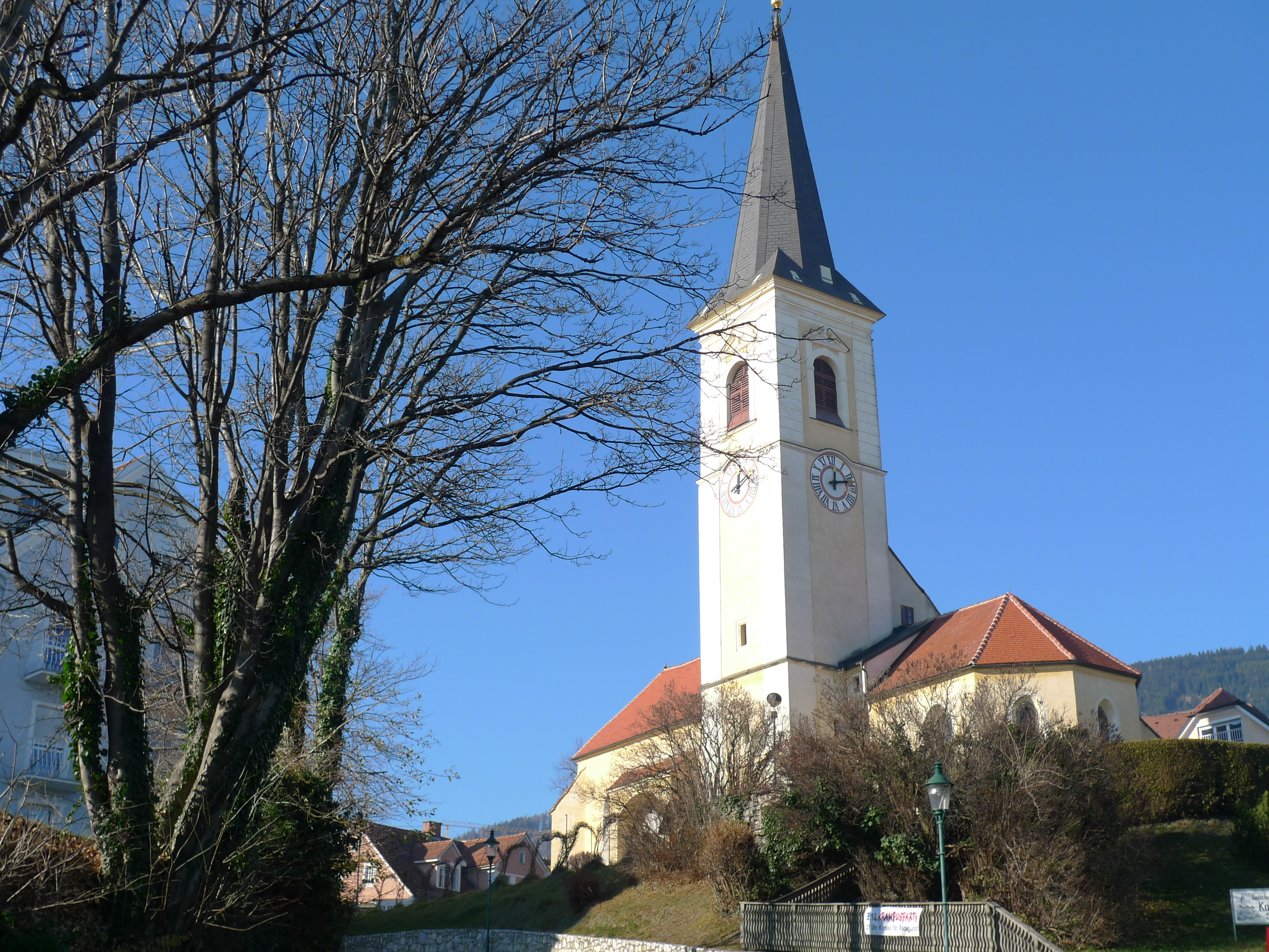 Kath. Pfarrkirche hl. Radegundis mit ehem. Friedhof, Umfriedung, Treppenanlage und Nebengebäude